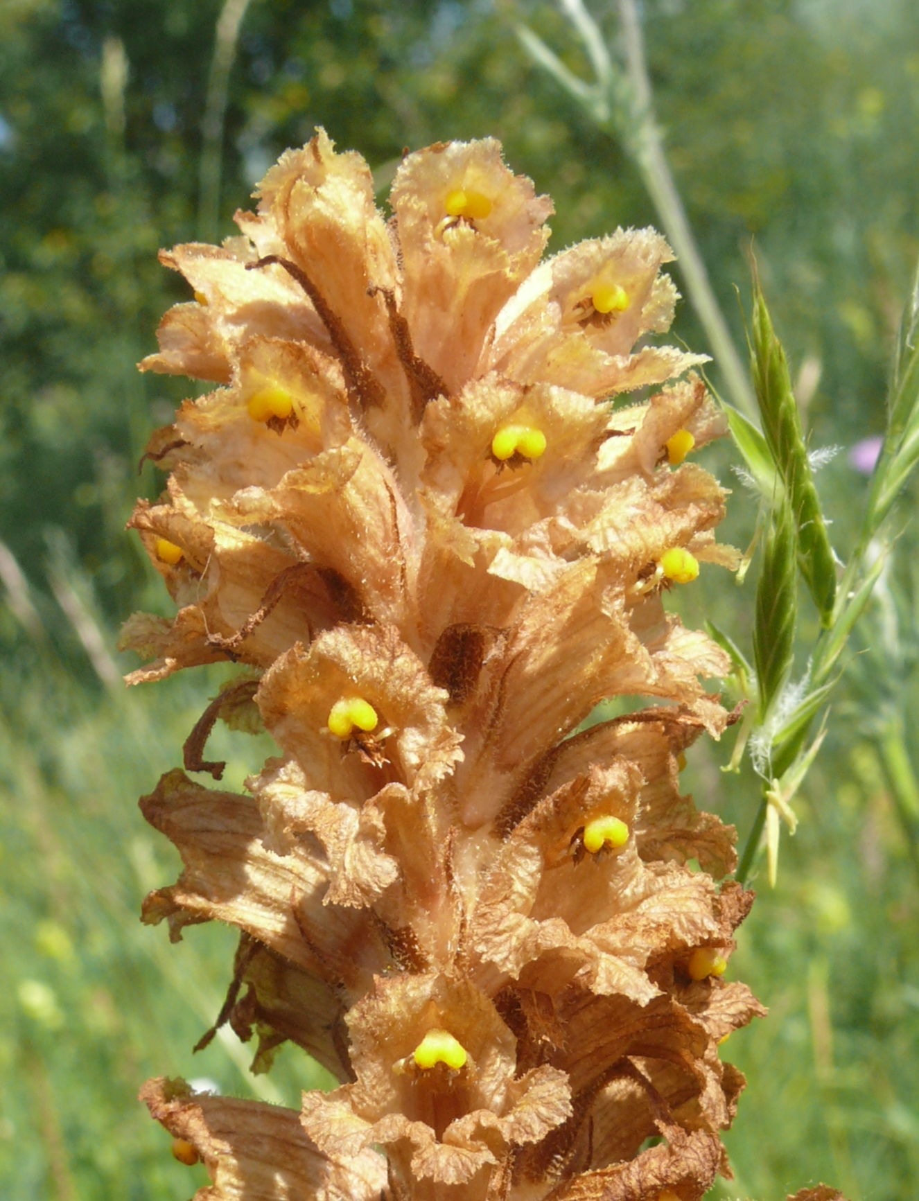 Orobanche elatior, Nördlinger Ries, Baden-Württemberg, Deutschland